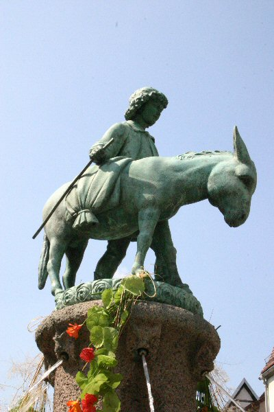 Halle (Saale), Eselsbrunnen, eigenes Foto von 2005, public domain, Mewes 08:00, 24. Apr 2005 (CEST)